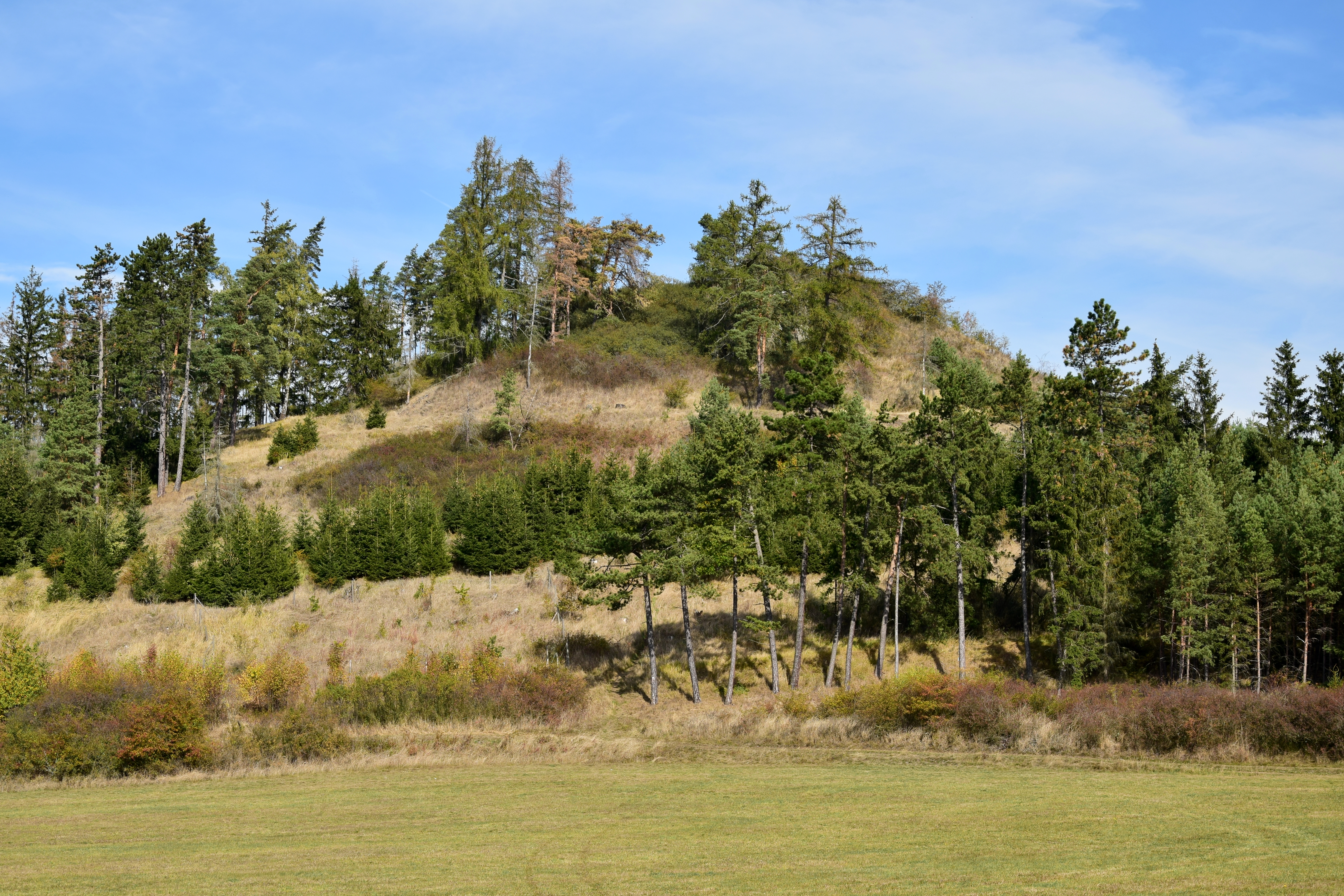 Zbraslavský vrch – vrcholová část kopce od jihozápadu